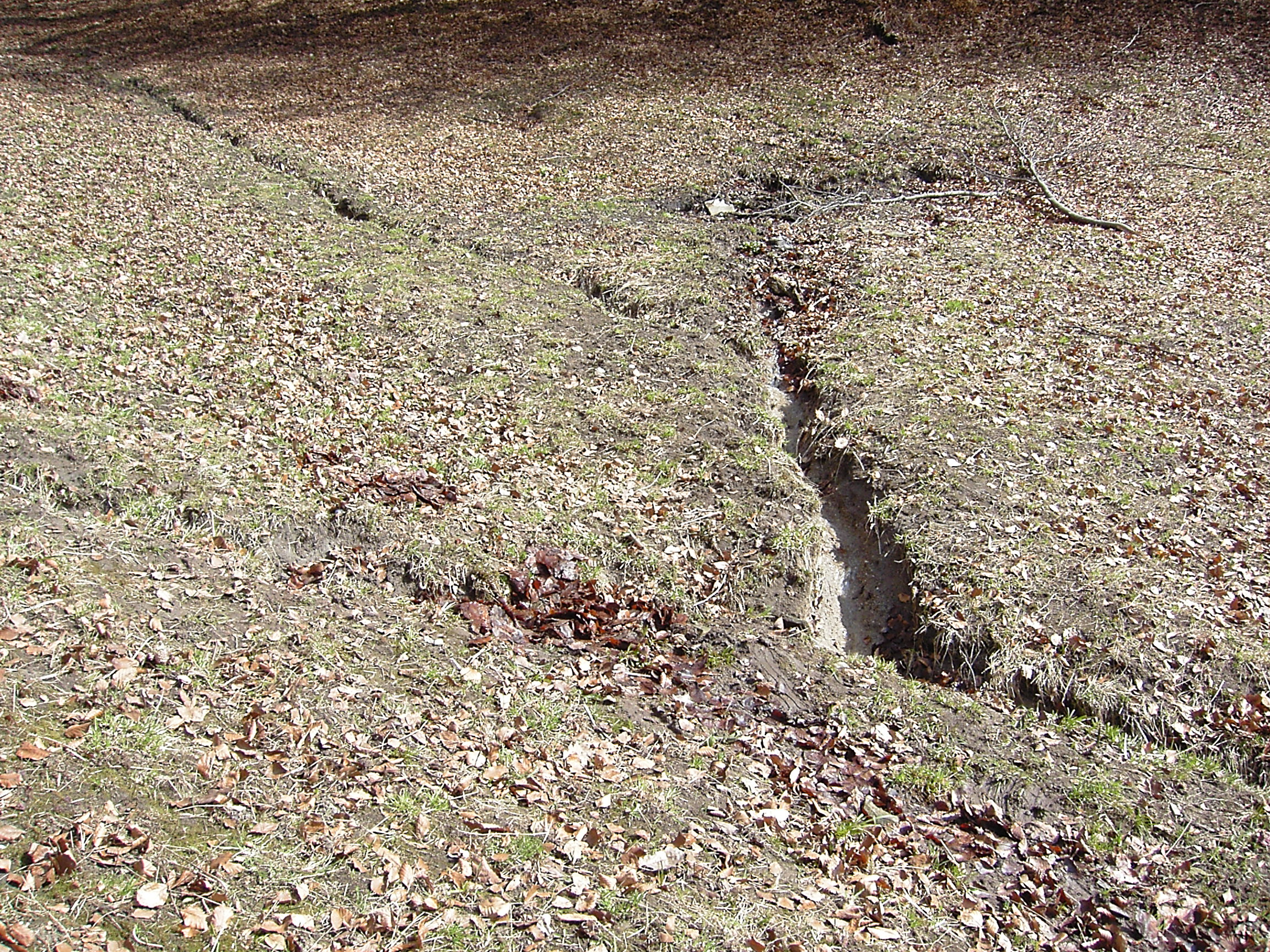 PR Bílé potoky. Napájení mokřadu.